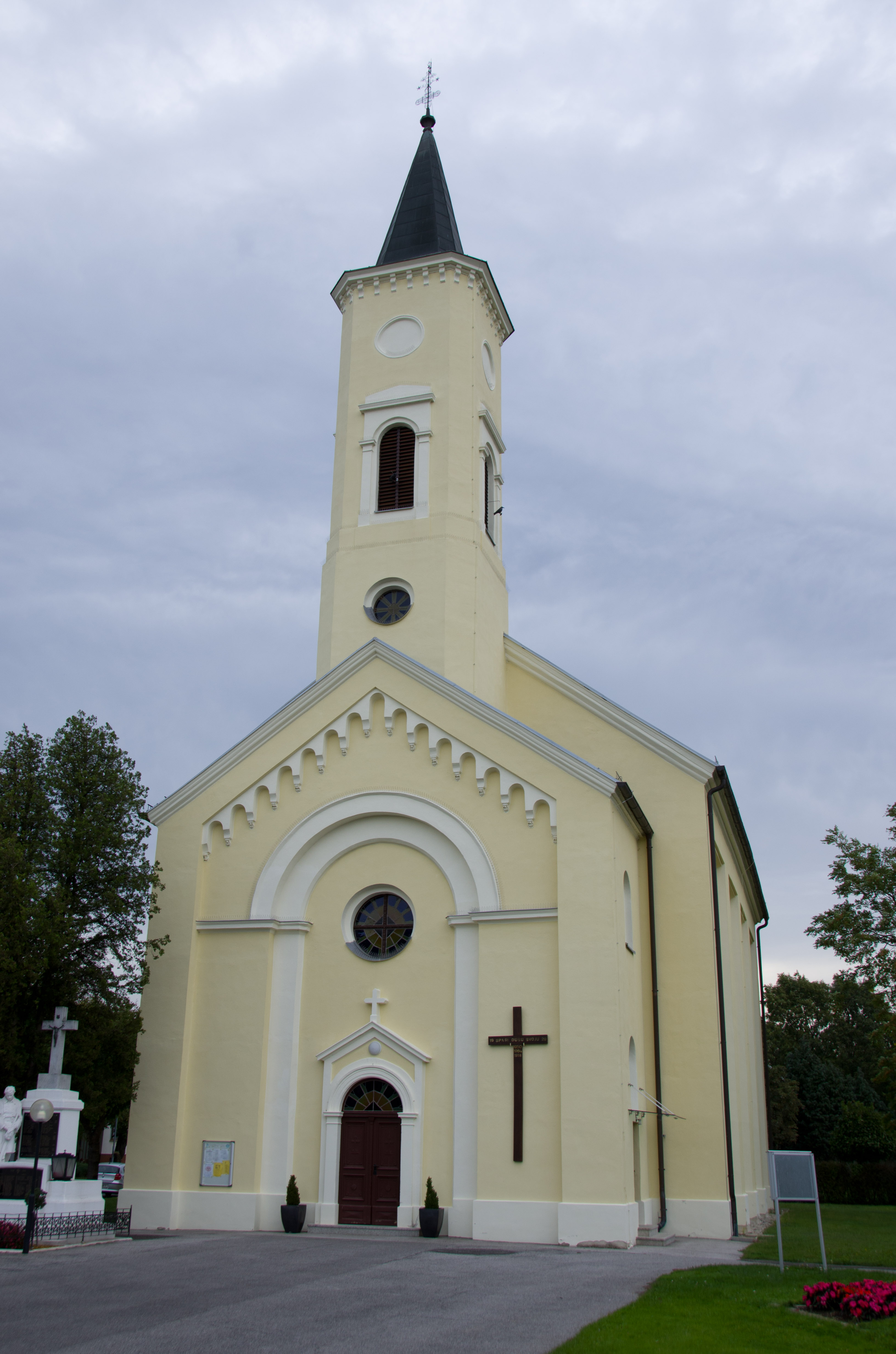 Kath. Pfarrkirche Allerheiligen